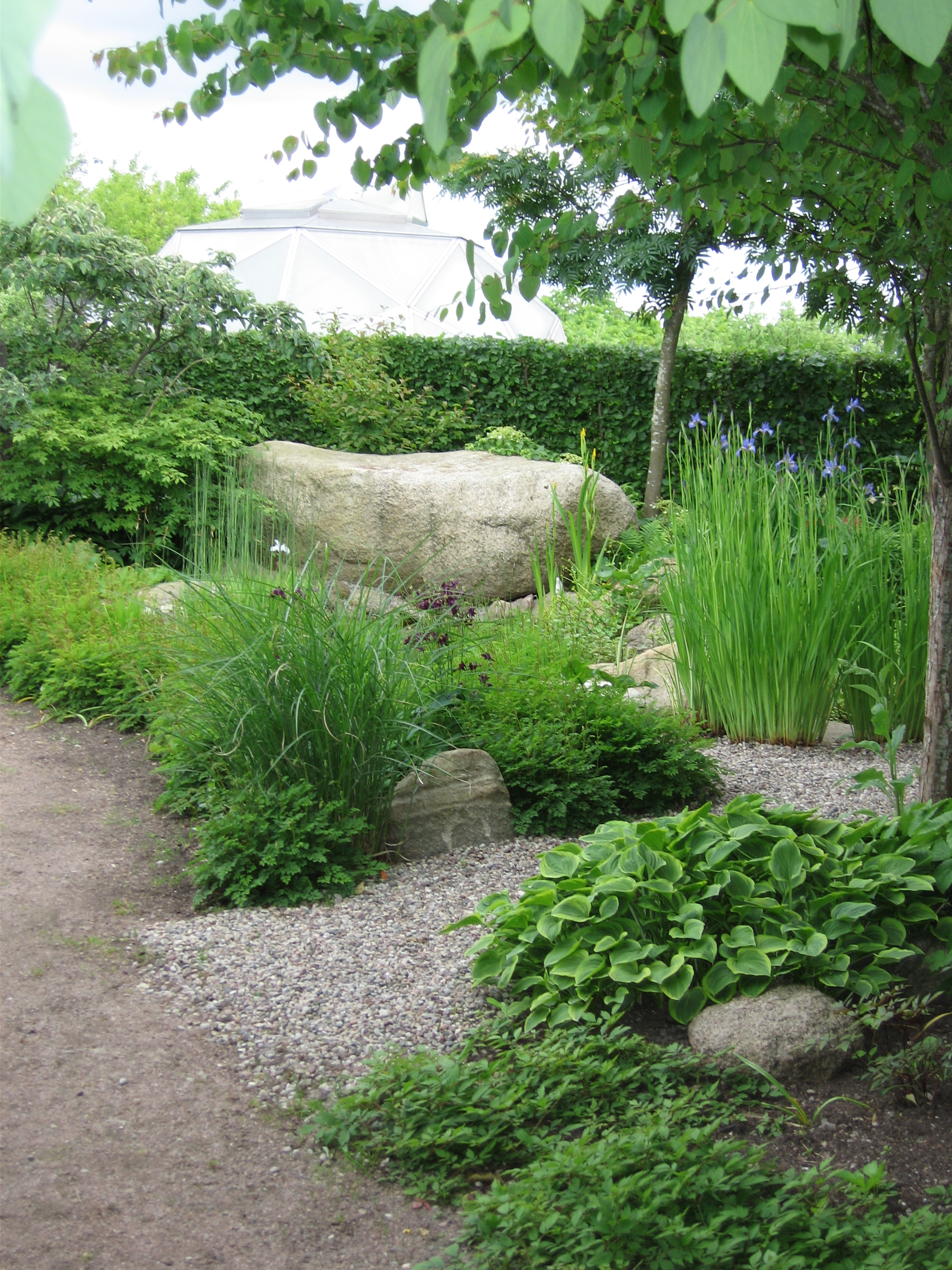 Alnarps Rehabiliteringsträdgård, den lilla dammen med "Johans sten"